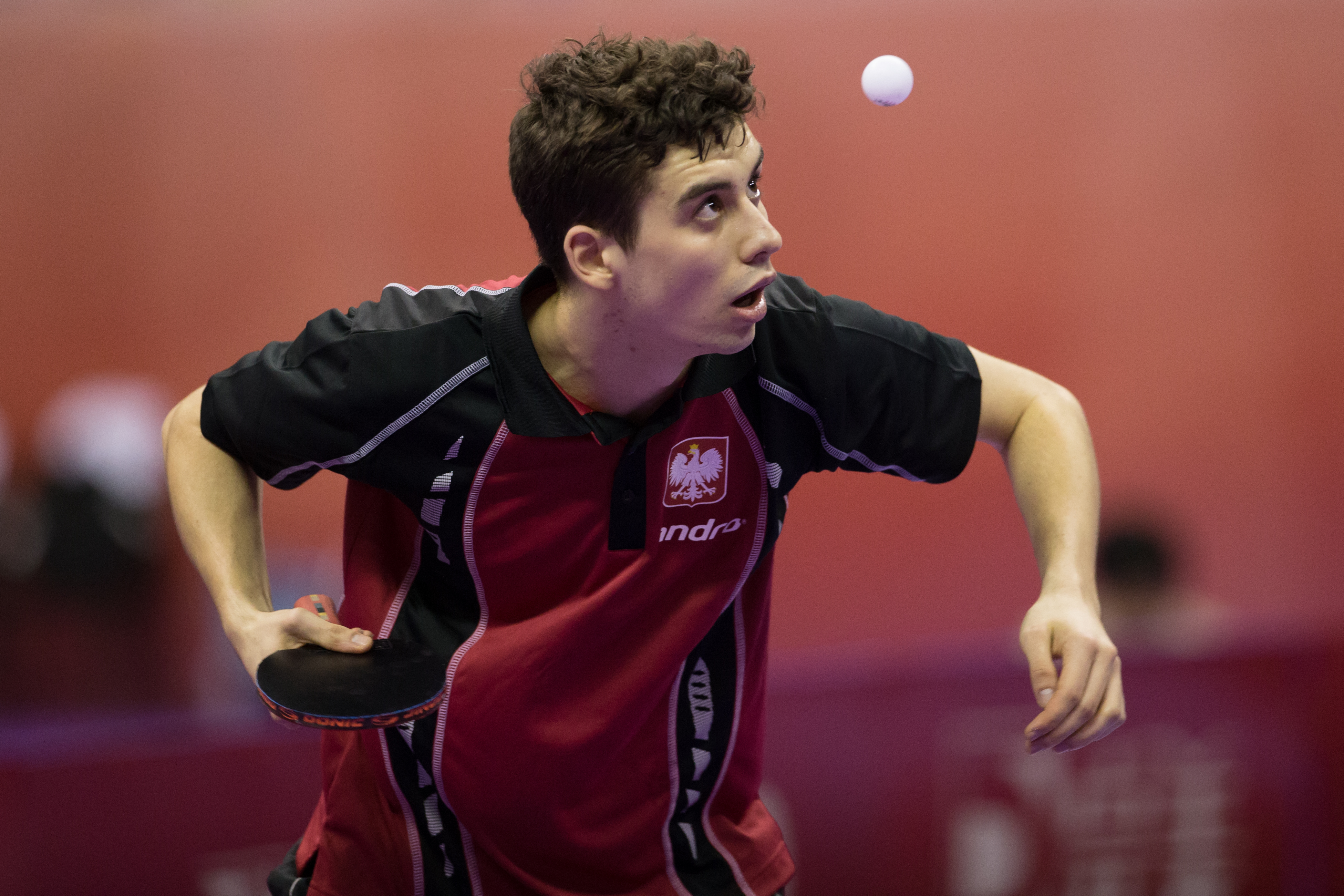 _K0K1482